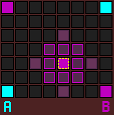 Dominate-Brett mit 8x8 Feldern und Zug bzw. Spring-Möglichkeiten